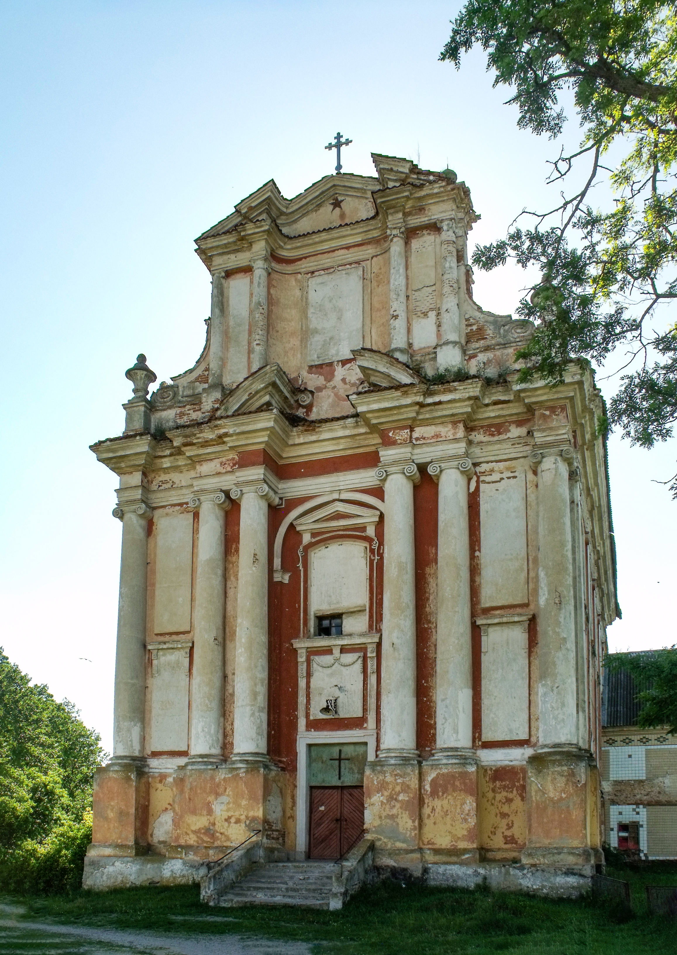 Монастир бернардинів - Костьол Діви Марії: Вінницька обл., Калинівський район, с. Іванів, вул. Гагаріна